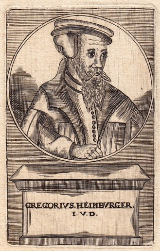 Gregorius Heimburgensis 1399-1472, German jurist, humanist and statesman.